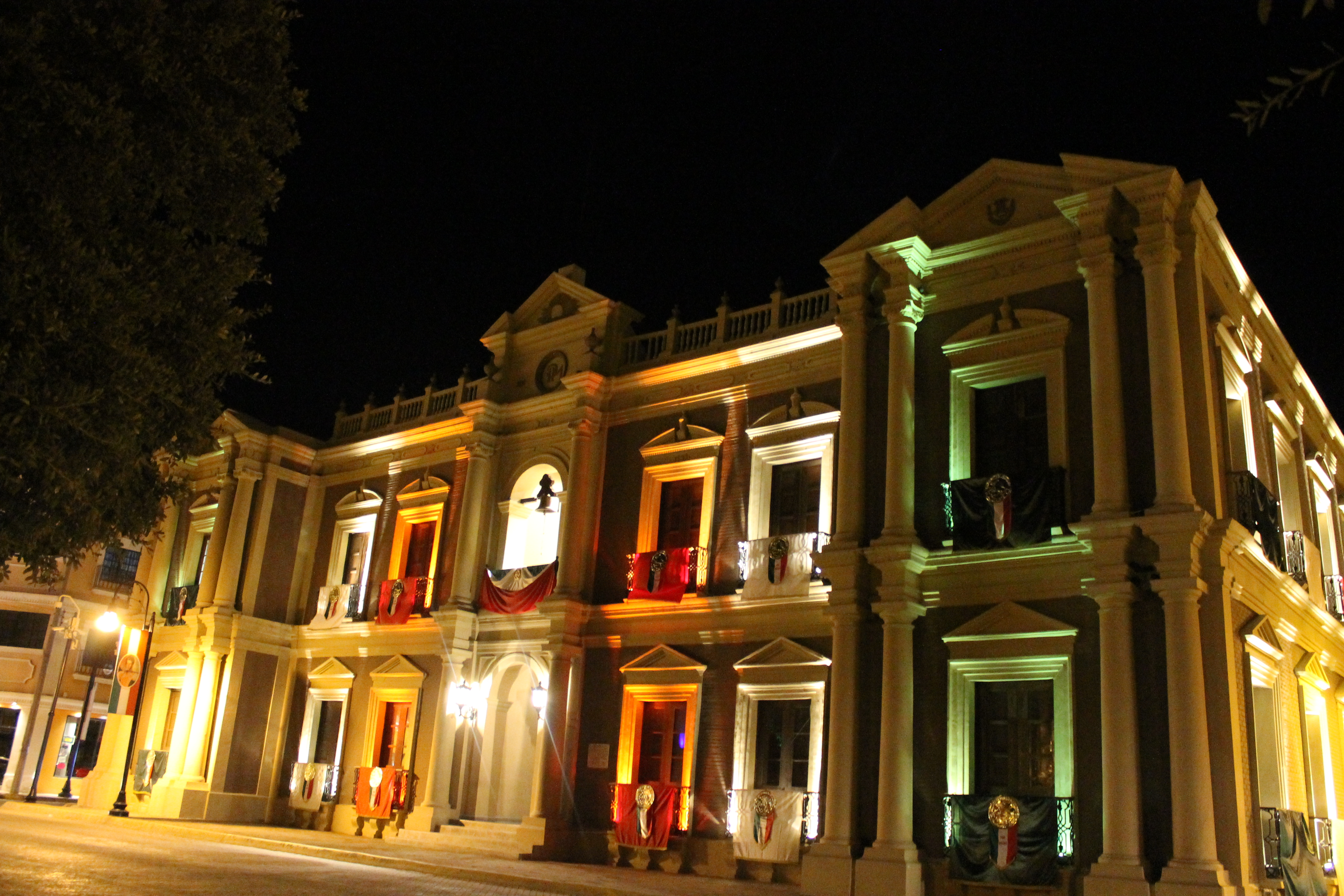 El Palacio Municipal de Linares con vivos de la conmemoración de la independencia de México